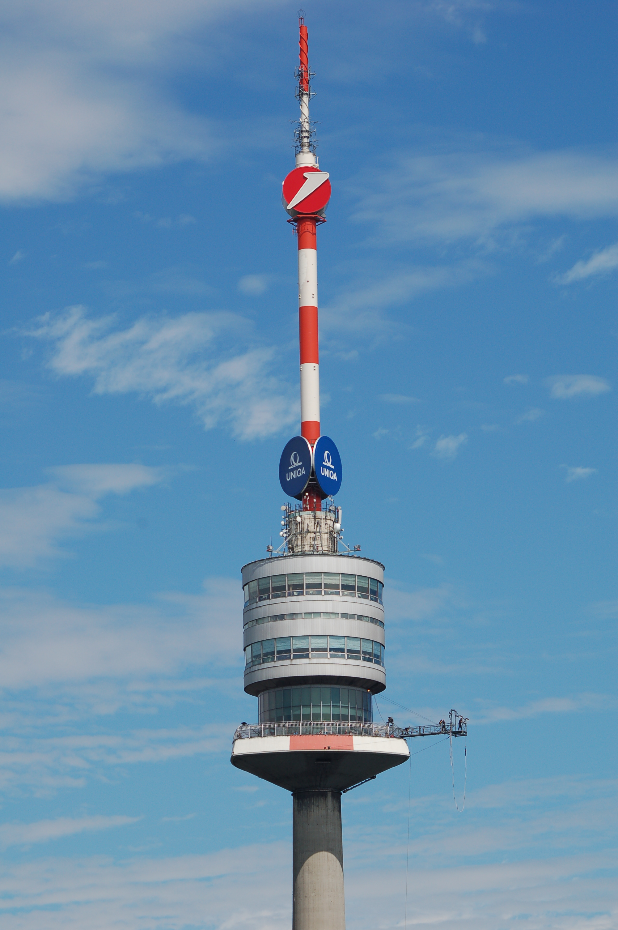 Donauturm Wien